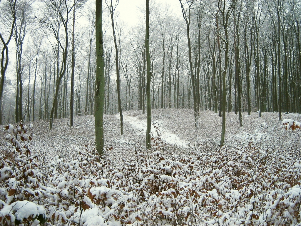 Buchennaturverjuengung in den Brohmer Bergen bei Jatznick (Vorpommern).